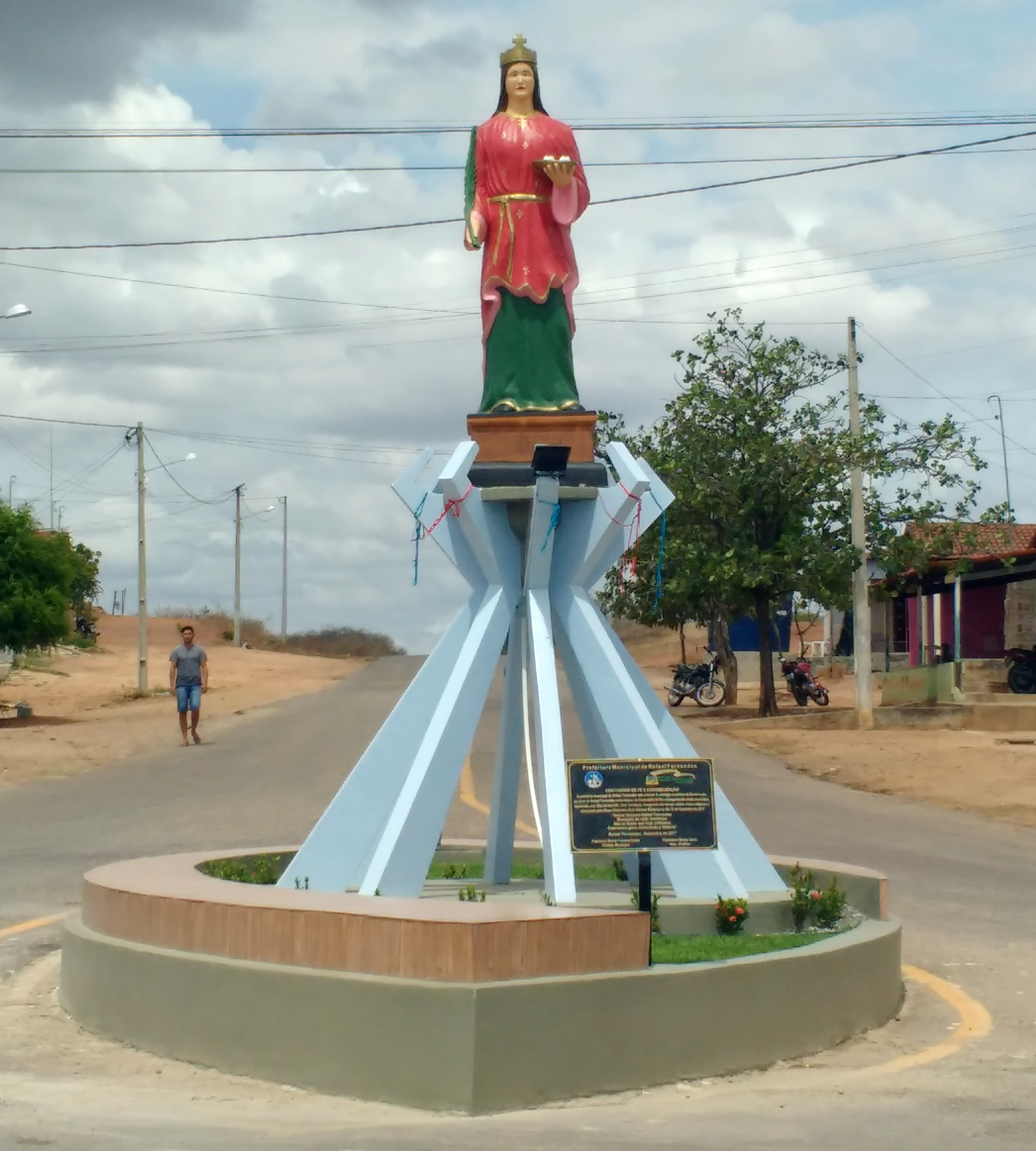 Estátua de Santa Luzia, padroeira de Rafael Fernandes, Rio Grande do Norte (Brasil)